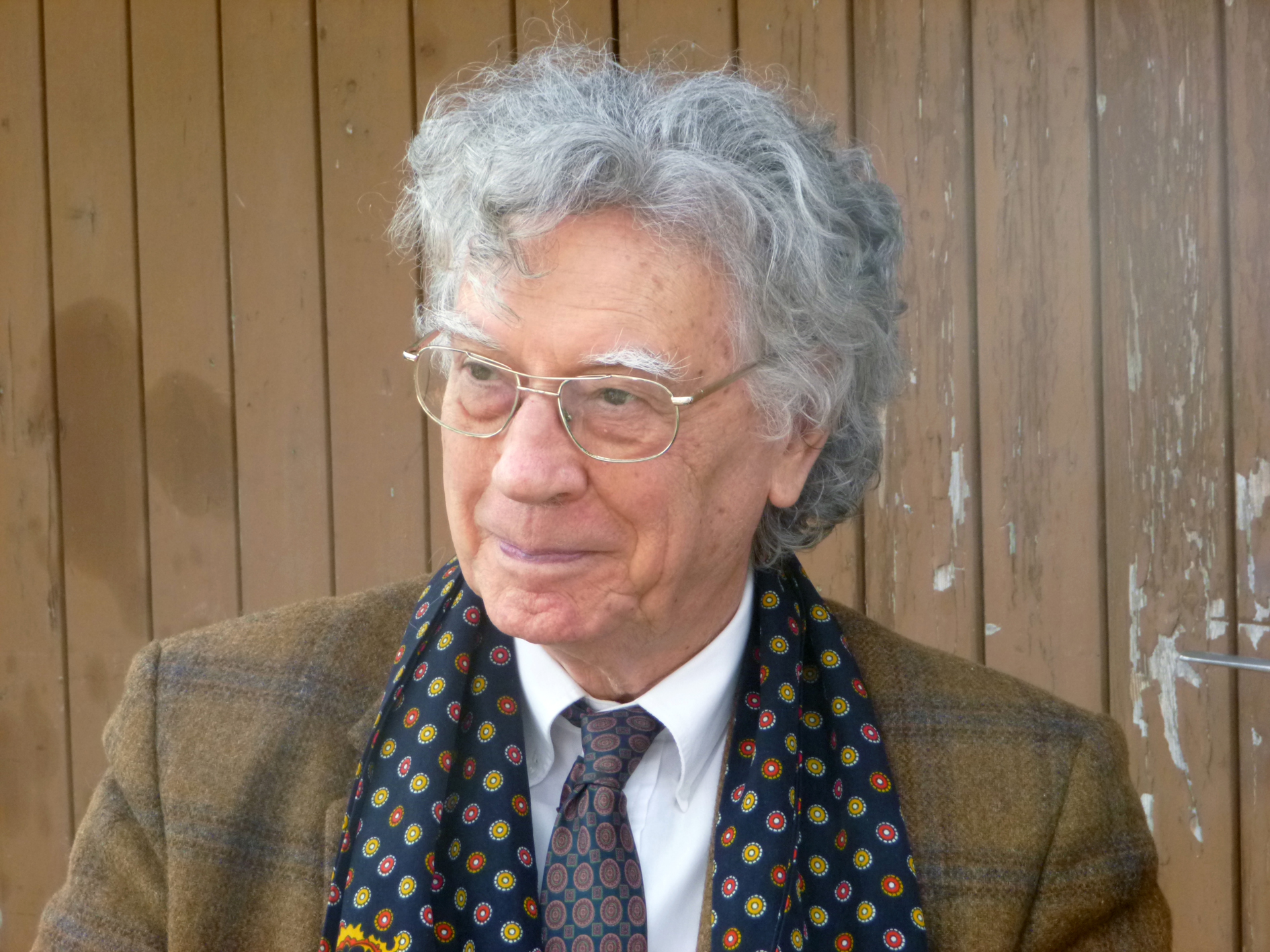 Portrait de Michel Duc Goninaz